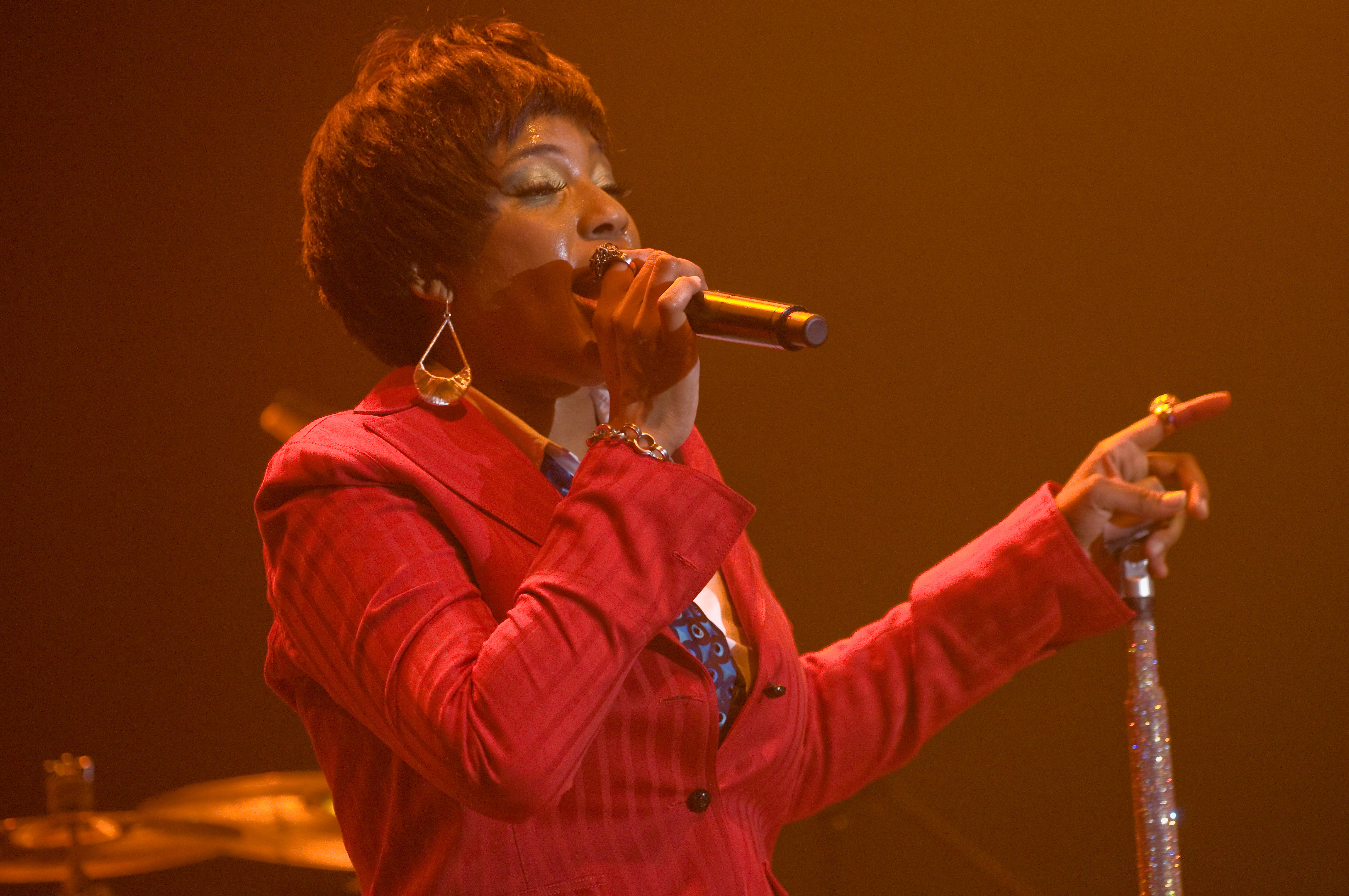 Macy Gray